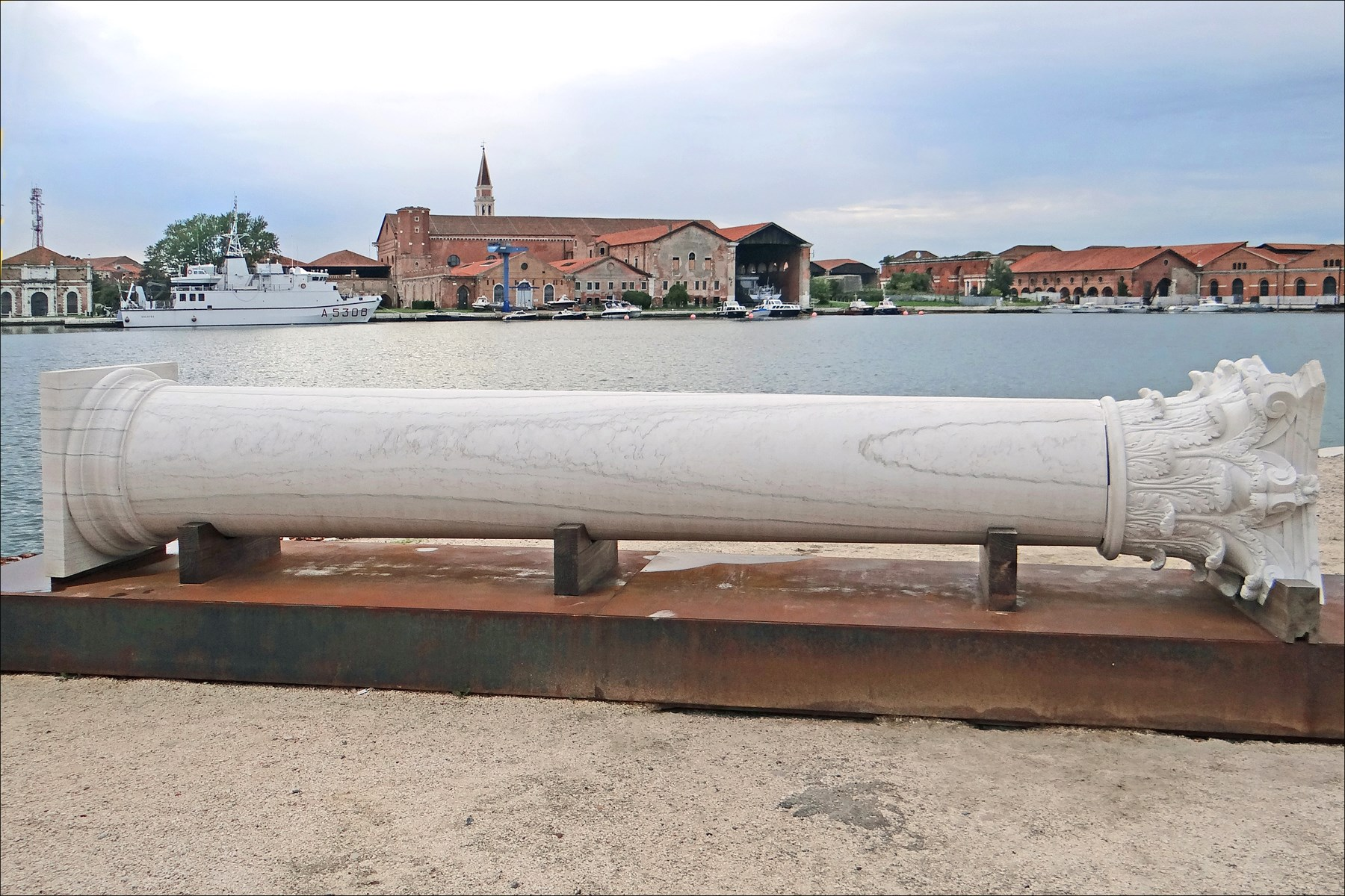 La colonne d'Adrian Paci présentée dans le cadre du pavillon national de l'Albanie dans l'Arsenal à la Biennale d'architecture 2014 de Venise "The Column", est une installation vidéo qui a été réalisée par l'artiste albanais Adrian Paci pour son exposition de février à mai 2013 au Jeu de Paume à Paris. Elle est présentée dans le pavillon national de l'Albanie à l'occasion de la Biennale d'architecture 2014 à Venise. Au cours d'un voyage dans un bateau de transport, une équipe d'artisans sculpteurs chinois a réalisé cette colonne dans le style gréco-romain à partir d'un bloc de marbre extrait d'une carrière chinoise. La petite équipe a travaillé dans la cale d'un bateau-usine lors d'une traversée. La vidéo retrace ce travail effectué dans des conditions environnementales aussi inattendues que particulièrement rudes. La colonne sculptée a été présentée dans le jardin des Tuileries à Paris en 2013, elle est ici montrée au bord de la grande darse dans l'Arsenal de Venise. Selon Adrian Paci, "The Column" est une réflexion sur la vitesse à laquelle l’offre et la demande doivent être satisfaites dans l’économie contemporaine. C'est aussi un prétexte à un voyage poétique entre l’Orient et l’Occident au cours duquel on voit des artisans chinois capables de tout faire avec une maestria époustouflante Adrian Paci. Vies en transit du 26 février au 12 mai 2013 au Jeu de Paume à Paris Site de la Biennale d'architecture 2014